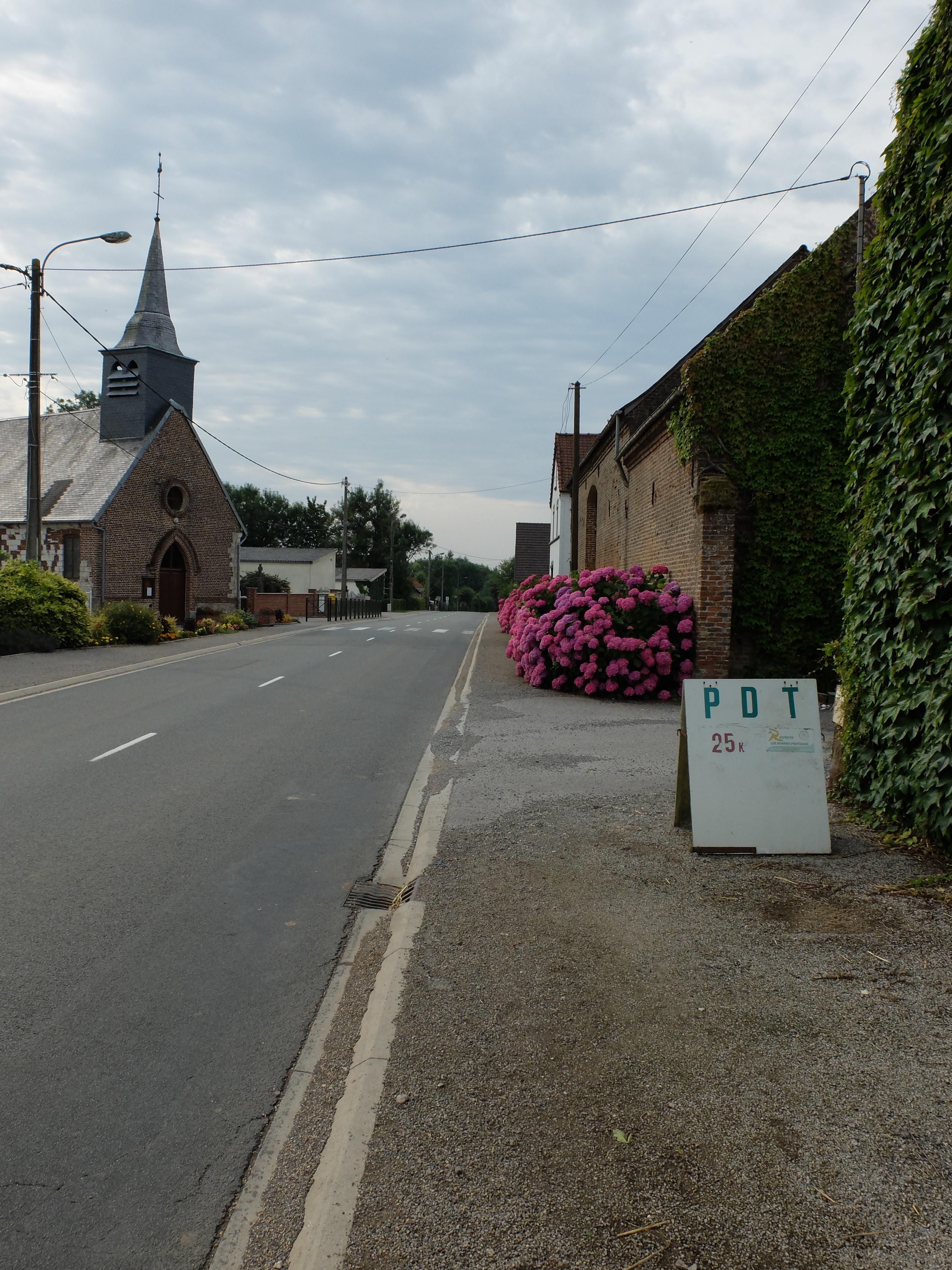 Vue de la rue principale de Maninghem.